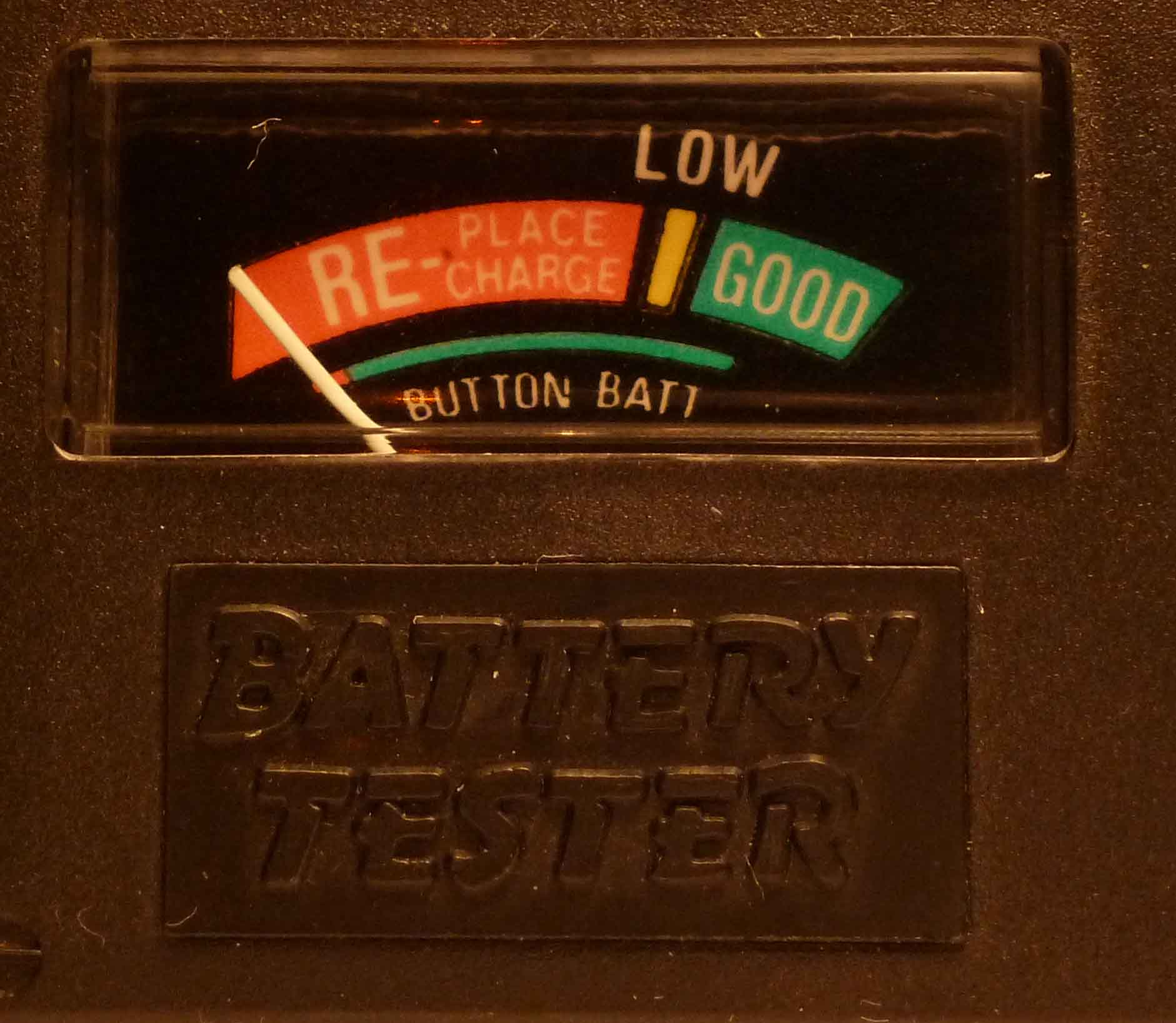 Battrietester